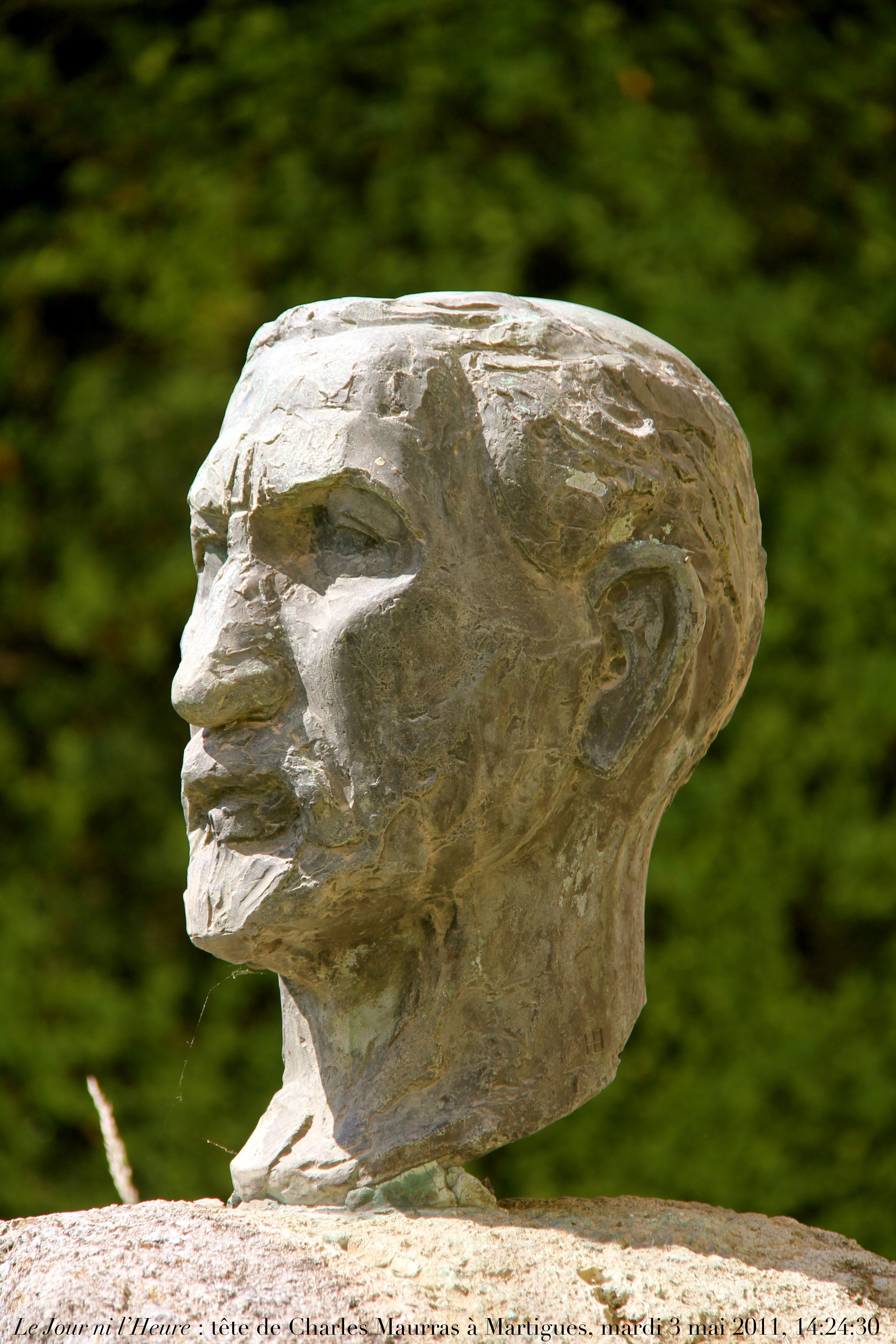 Tête de Charles Maurras, 1868-1952, dans son jardin de Martigues, 22, chemin du Paradis, Bouches-du-Rhône, Provence.